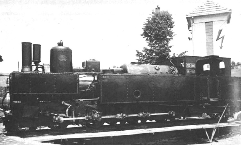 Lokomotive BHStB Vc6 war eine Stütztenderlokomotive in Bosnischer Spurweite mit fünf Kuppelachsen und Klose-Lenkwerk. In Betrieb genommen wurde die Maschine von der Bosnisch-Herzegowinischen Staatsbahn (BHStB) im Jahr 1893 als Vc6 Nr. 61. Bei den Jugoslawischen Staatsbahnen (JDŽ) erhielt die Lokomotive die Bezeichnung JDŽ 191-001. Der Klose-Mechanismus war zum Zeitpunkt der Aufnahme ausgebaut.